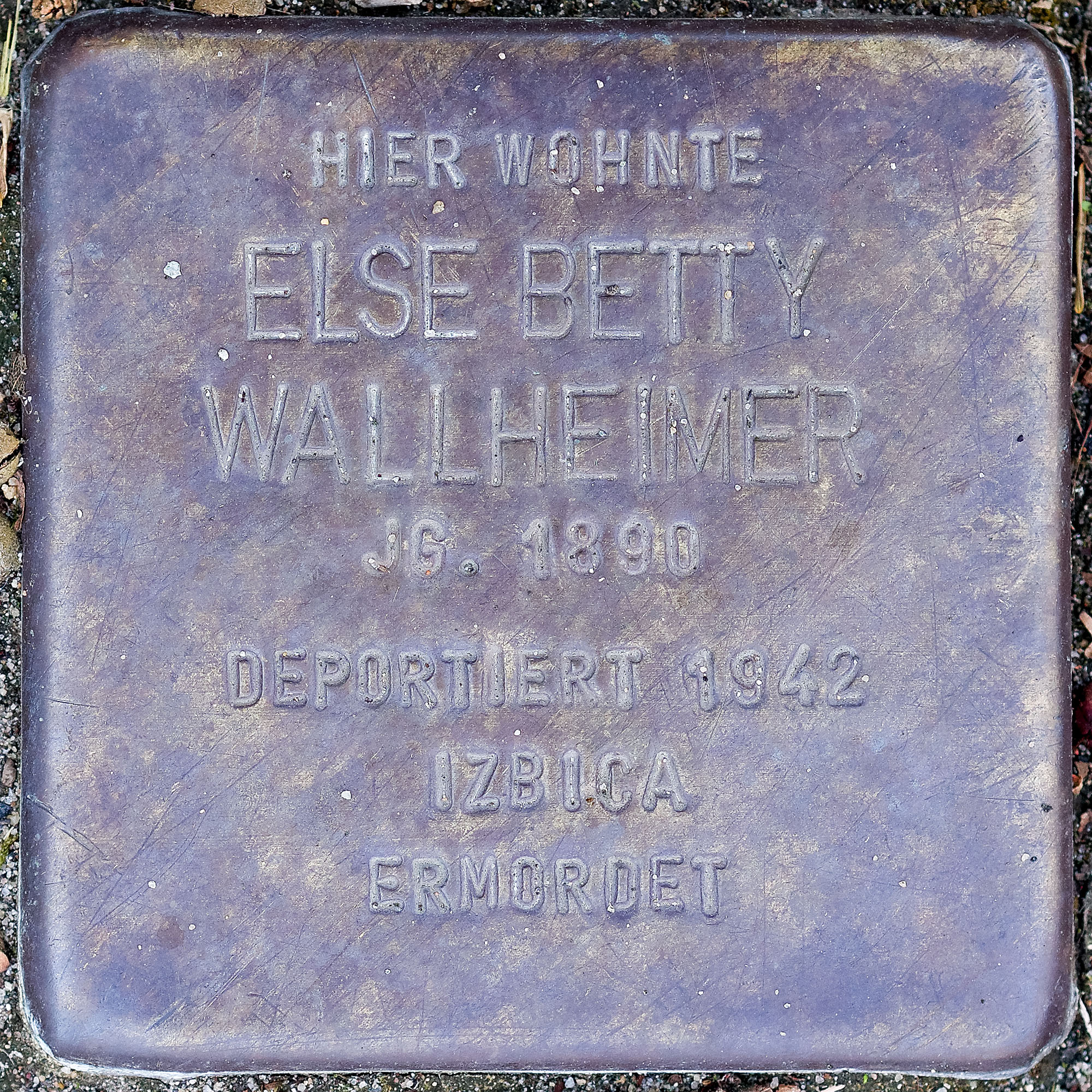 Stolpersteine MG: Wallheimer, Else Betty